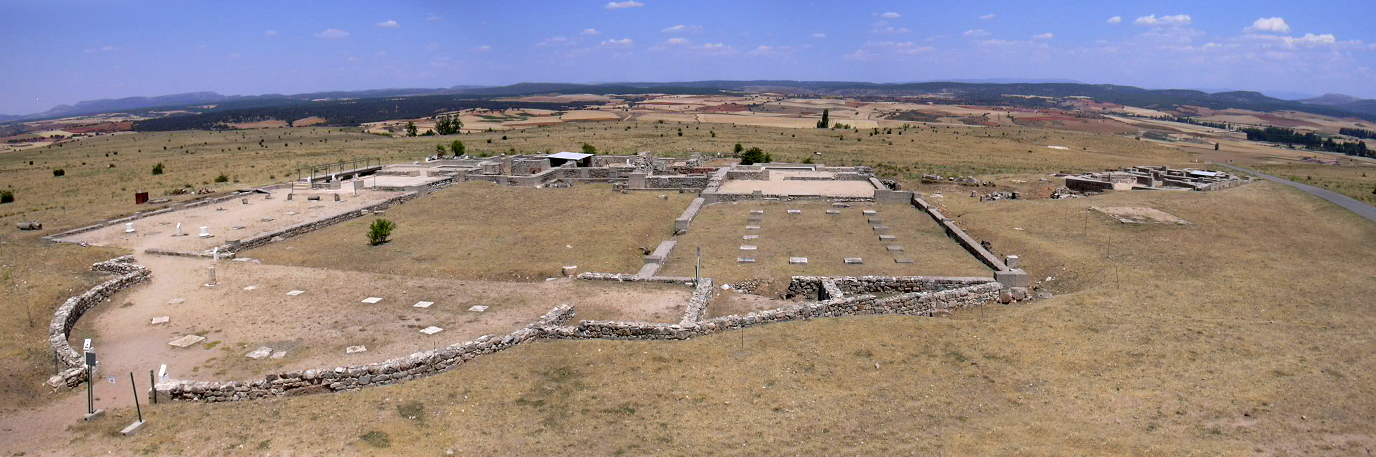 Termas de Clunia (Brugos)